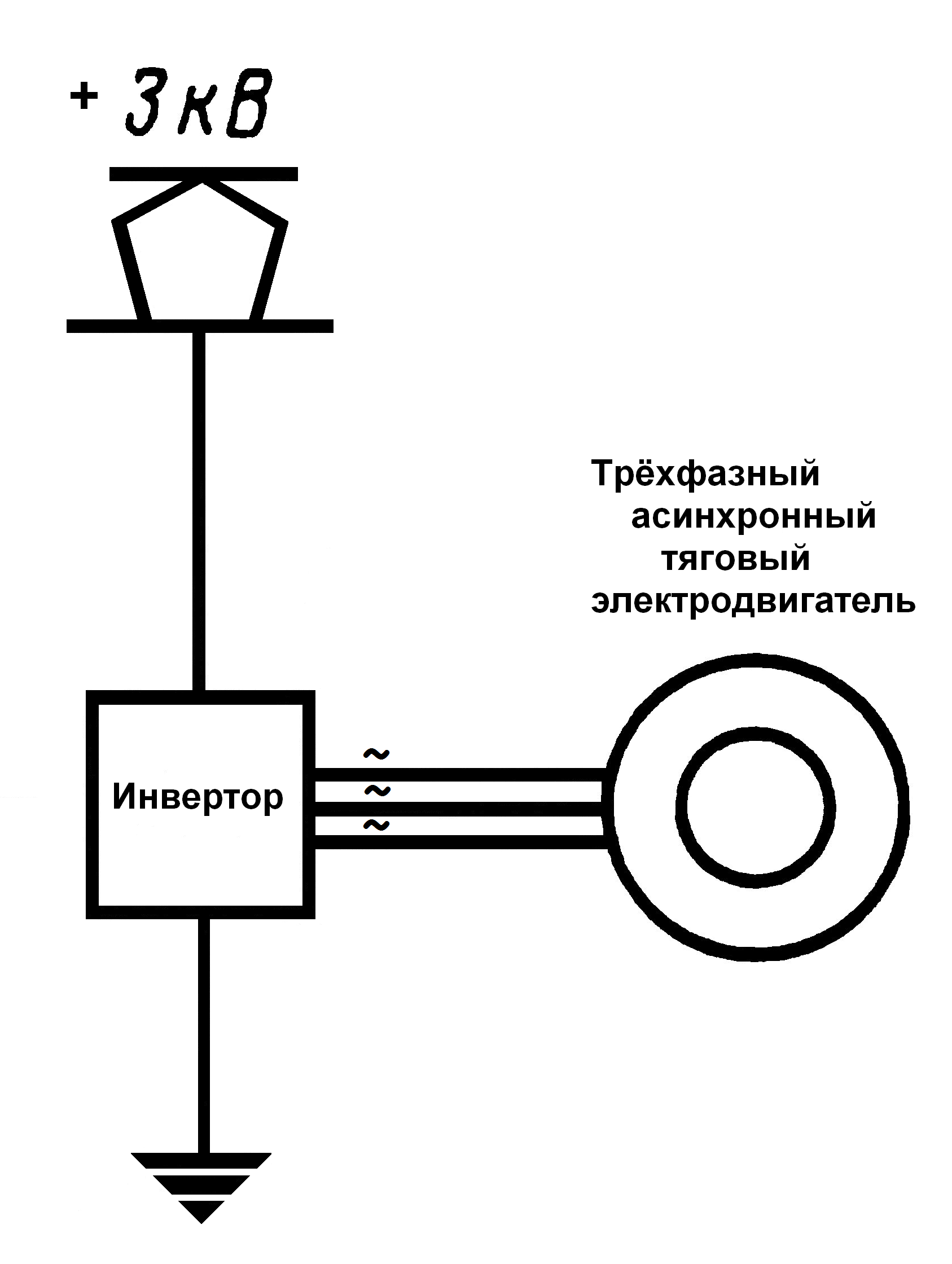 Схема электровоза постоянного тока с асинхронным двигателем